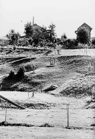 Fotgrafi av Karl Lärka, Lärkas stuga på Klickbåck, Sollerön